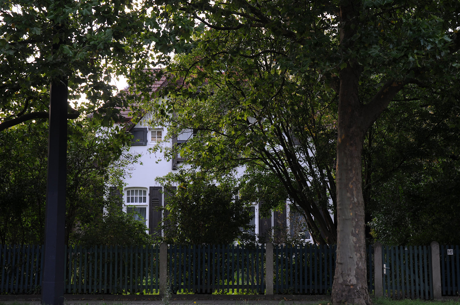 Haus Bätjer in Bremen, Leher Heerstraße 16.Das abgebildete Objekt ist ein geschütztes Kulturdenkmal in der Freien Hansestadt Bremen, mit der Nr. 0840 beim Landesamt für Denkmalpflege registriert.